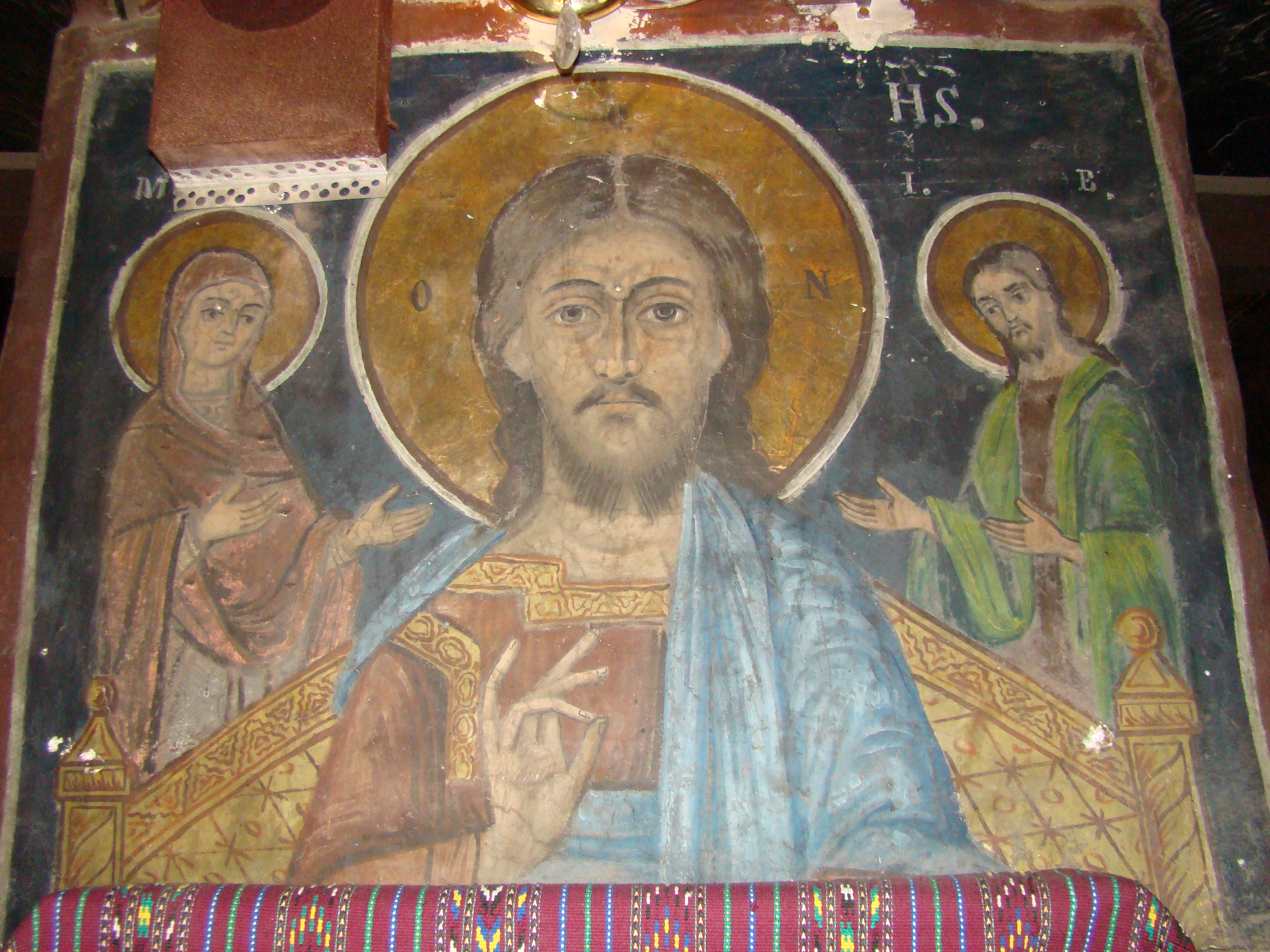 Biserica „Intrarea în Biserică a Maicii Domnului” sat Bărbătești, cătun Mierlești, județul Vâlcea